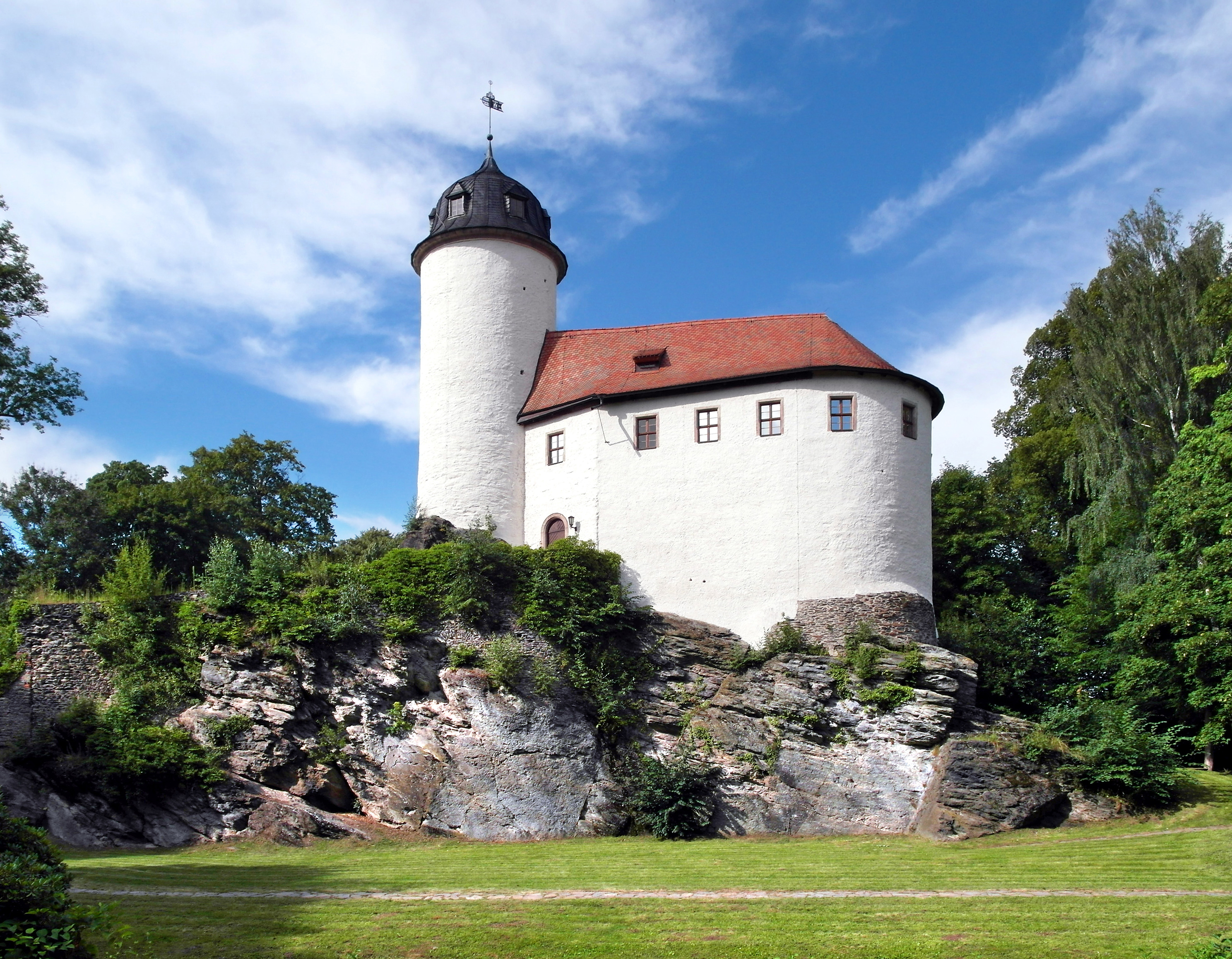 01.08.2016 09117 Rabenstein (Chemnitz), Oberfrohnaer Str. 149 (GMP: 50.833178,12.818224): Burg Oberrabenstein ist die kleinste mittelalterliche Burg Sachsens. Erstmals erwähnt wurde d. Höhenburg im Jahre 1336 in einer Urkunde von Ludwig dem Bayern, in der er sie seinem Schwiegersohn, dem Markgrafen Friedrich von Meißen, als Reichslehen verspricht. Der Baubeginn der Burg lag vermutlich im 12. Jh.. Ab 1375 zeitweilig im Besitz des Benediktinerklosters Chemnitz. Mehrfache Besitzerwechsel und Umbauten. Letzter Eigentümer bis 1945 war Fabrikbesitzer Matthé Paul Herfurth. Heute ist die Burg Außenstelle des Schloßbergmuseums Chemnitz. [SAM7427.JPG]20160801860DR.JPG(c)Blobelt